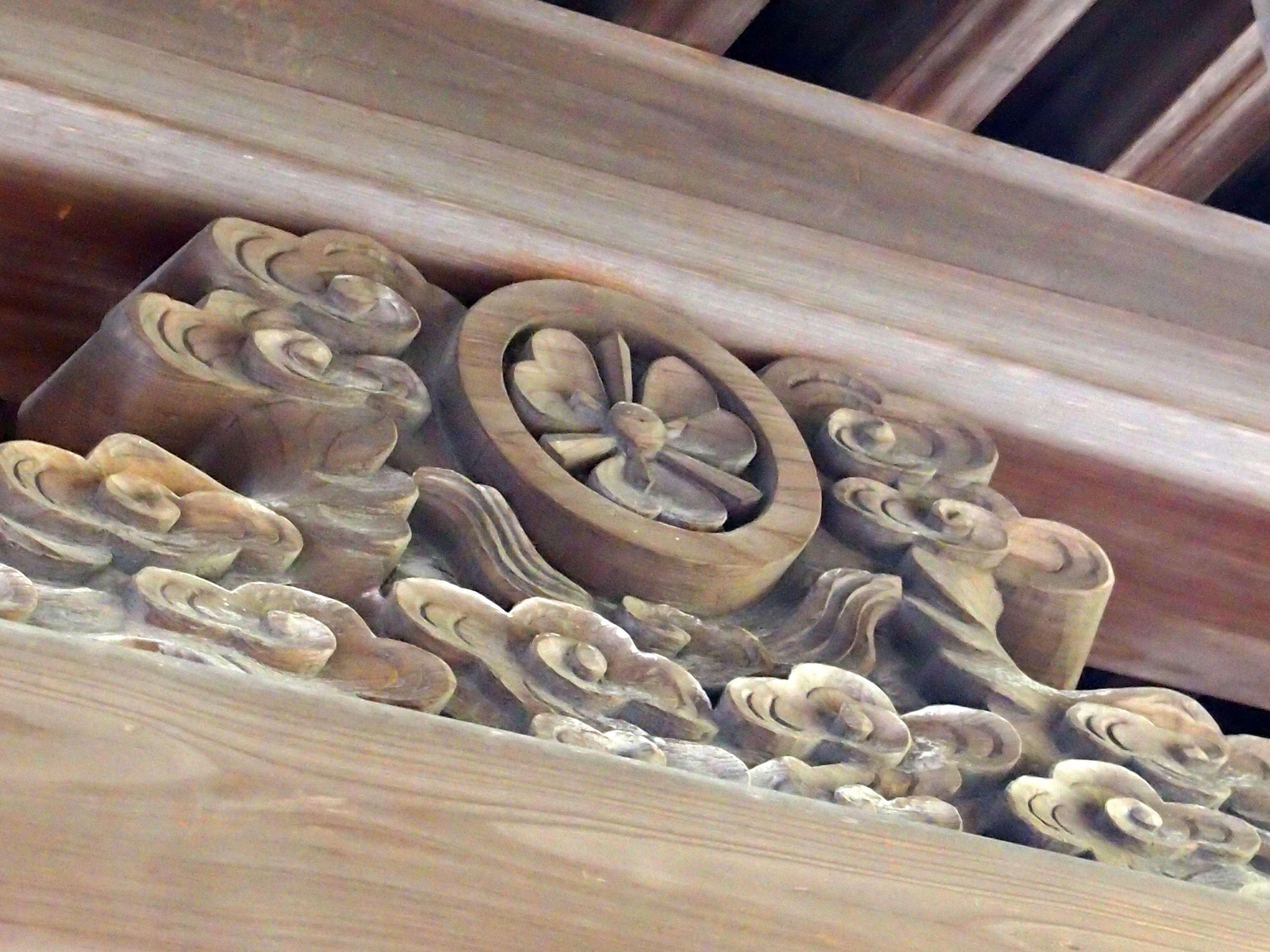 鞠山神社 酒井氏の家紋